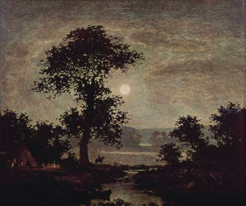 Ralph Albert Blakelock: Mondlicht (1885)